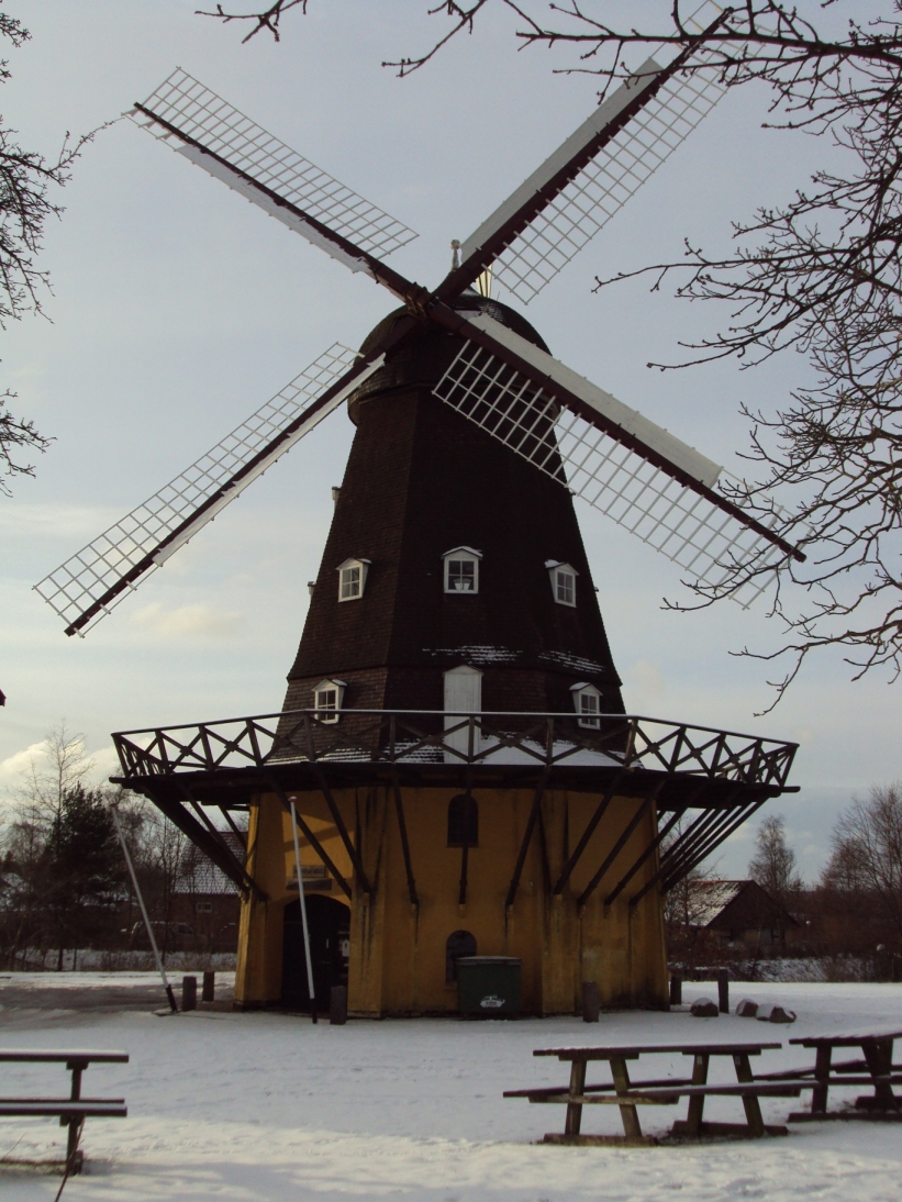 Alte Mühle in Hørsholm